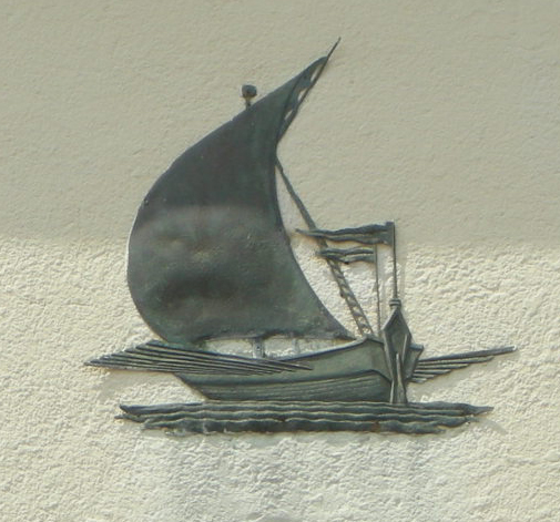 Stabilimento principe di piemonte, veliero decorativo